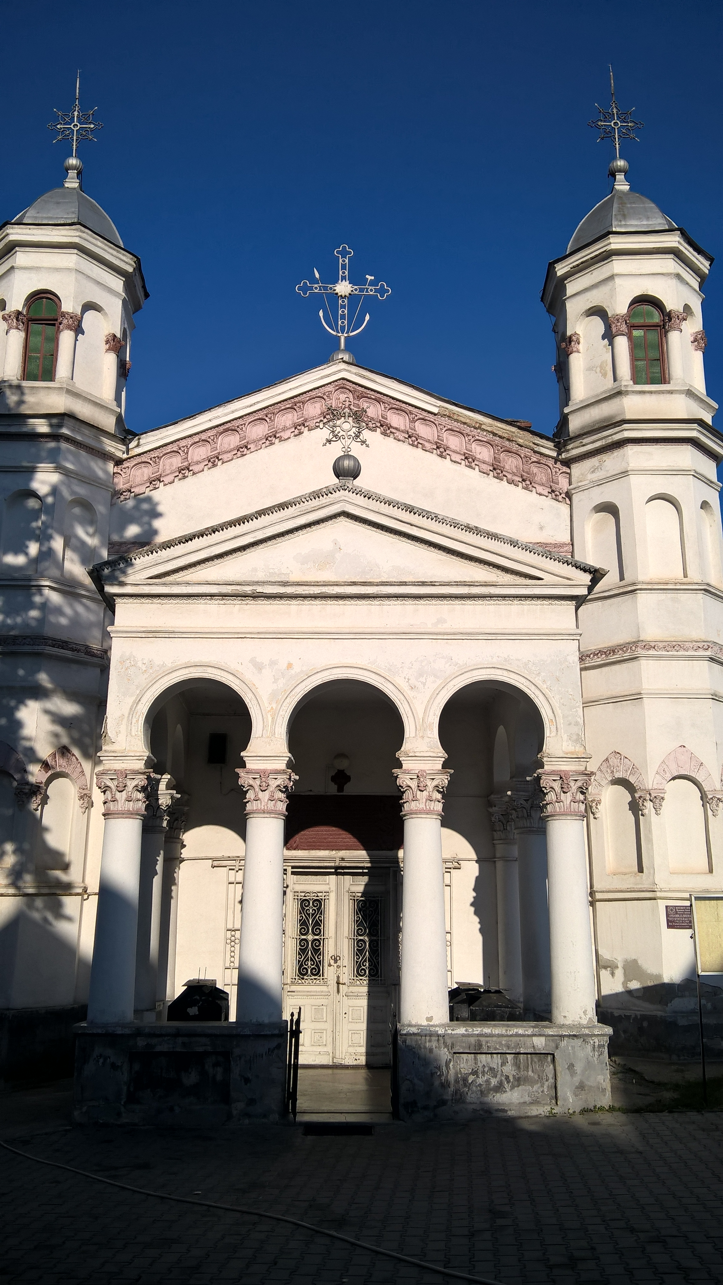 Biserica „Toți Sfinții” - Hagi Enuș 01